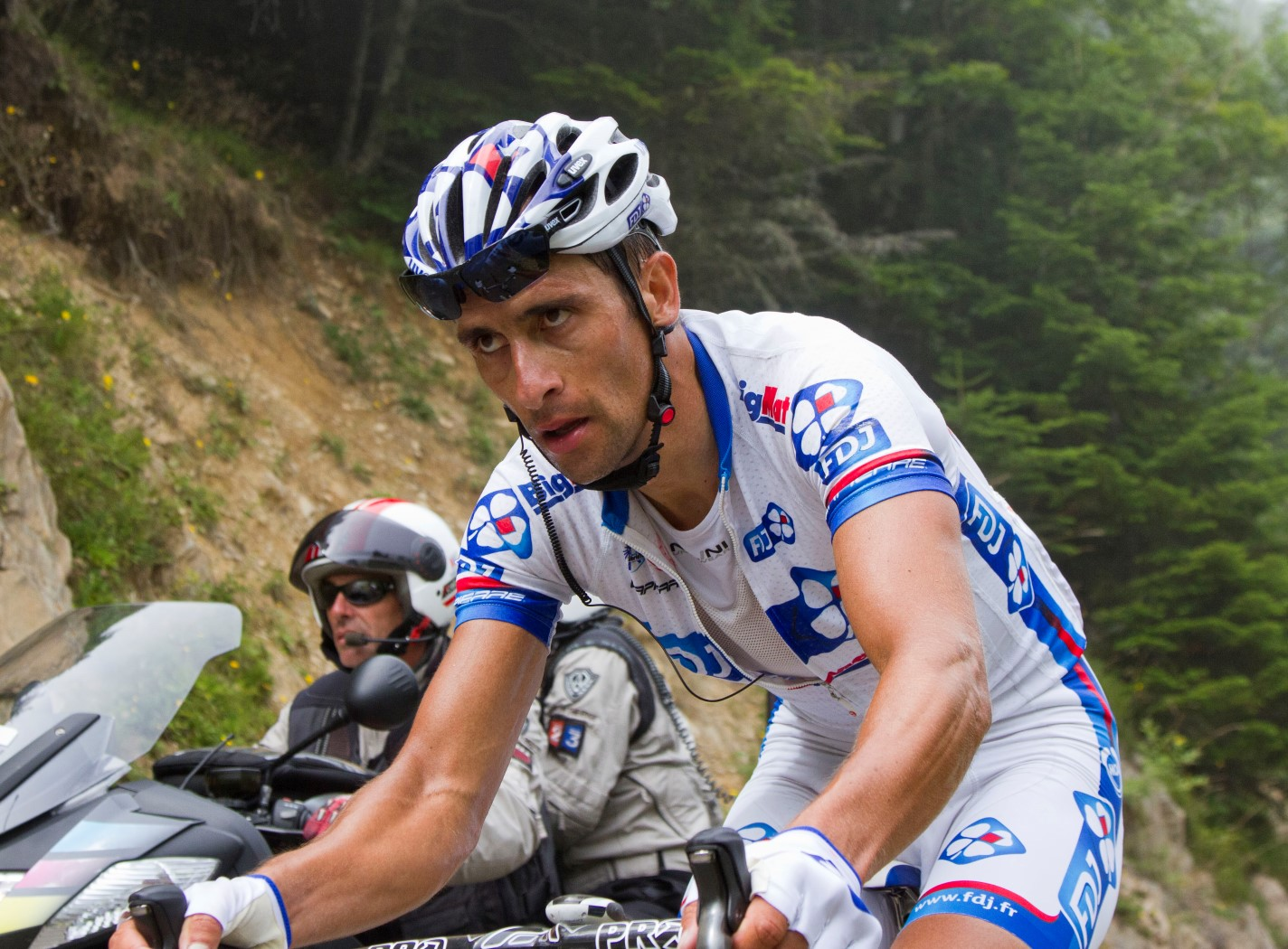 035 casar met veelzeggende blik